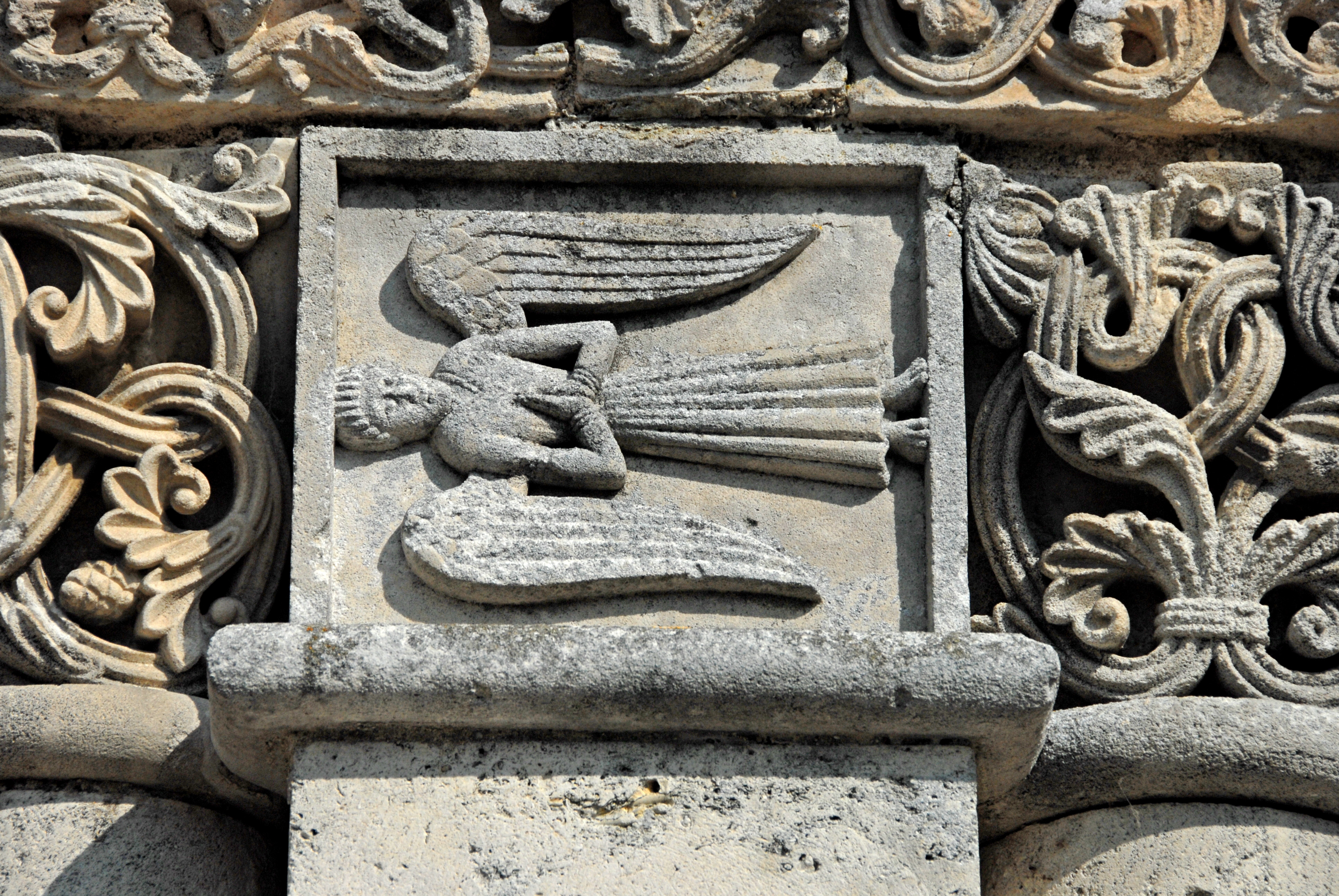 Genzac-la-Pallue, Kapitellbündel, Hauptportal rechts